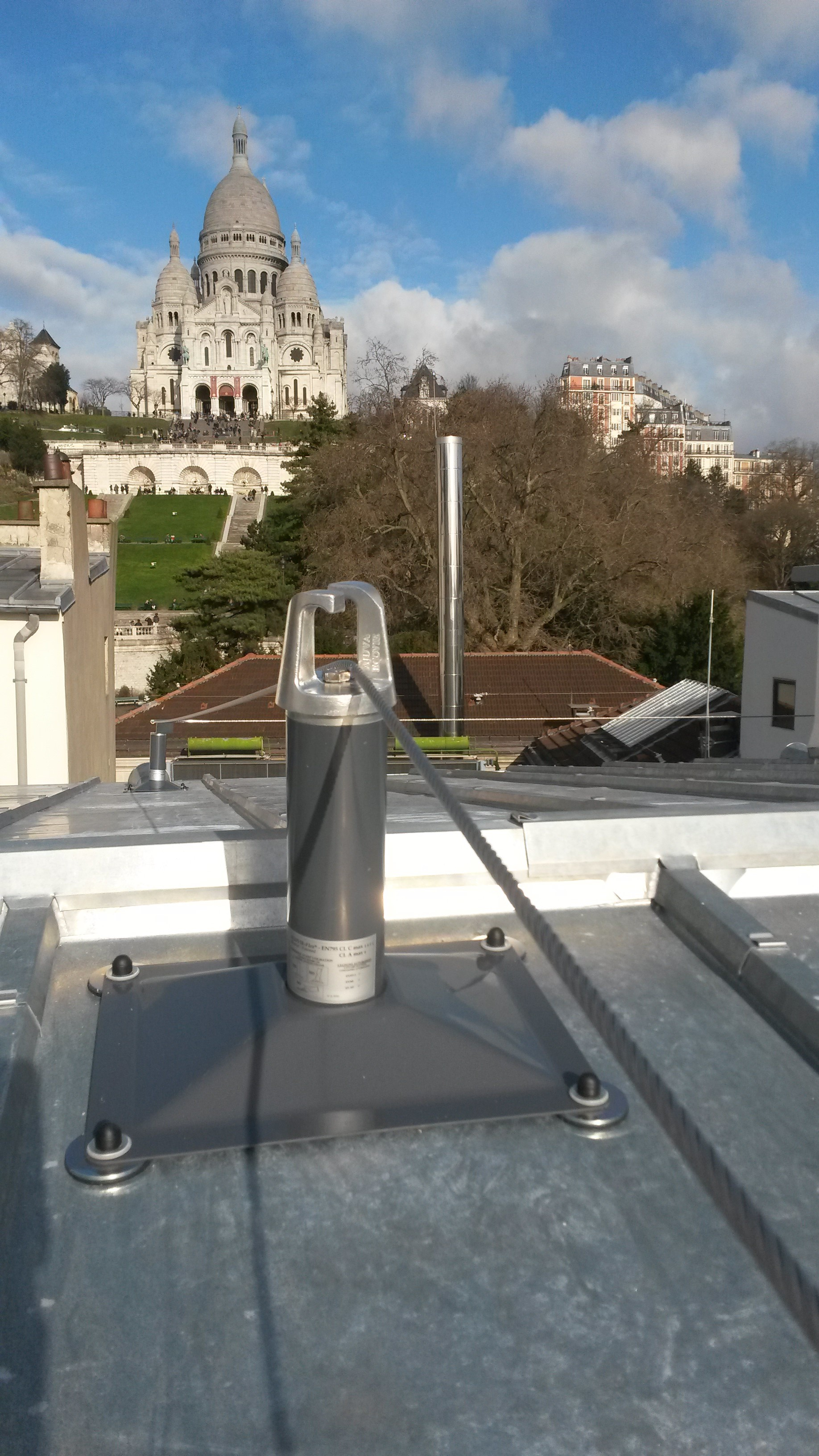 Ligne de vie ECOVIE sur potelet Eco-Flex d'AJUVA Safety